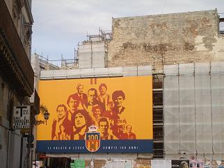 Manifesto del centenario del U.s. Lecce. Foto personale --Galiano.M (msg) 17:48, 11 apr 2008 (CEST)Galiano.M